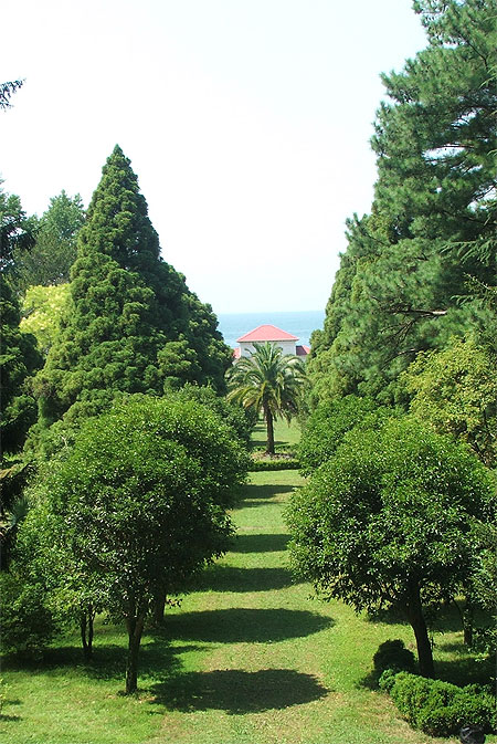 Botanical Garden